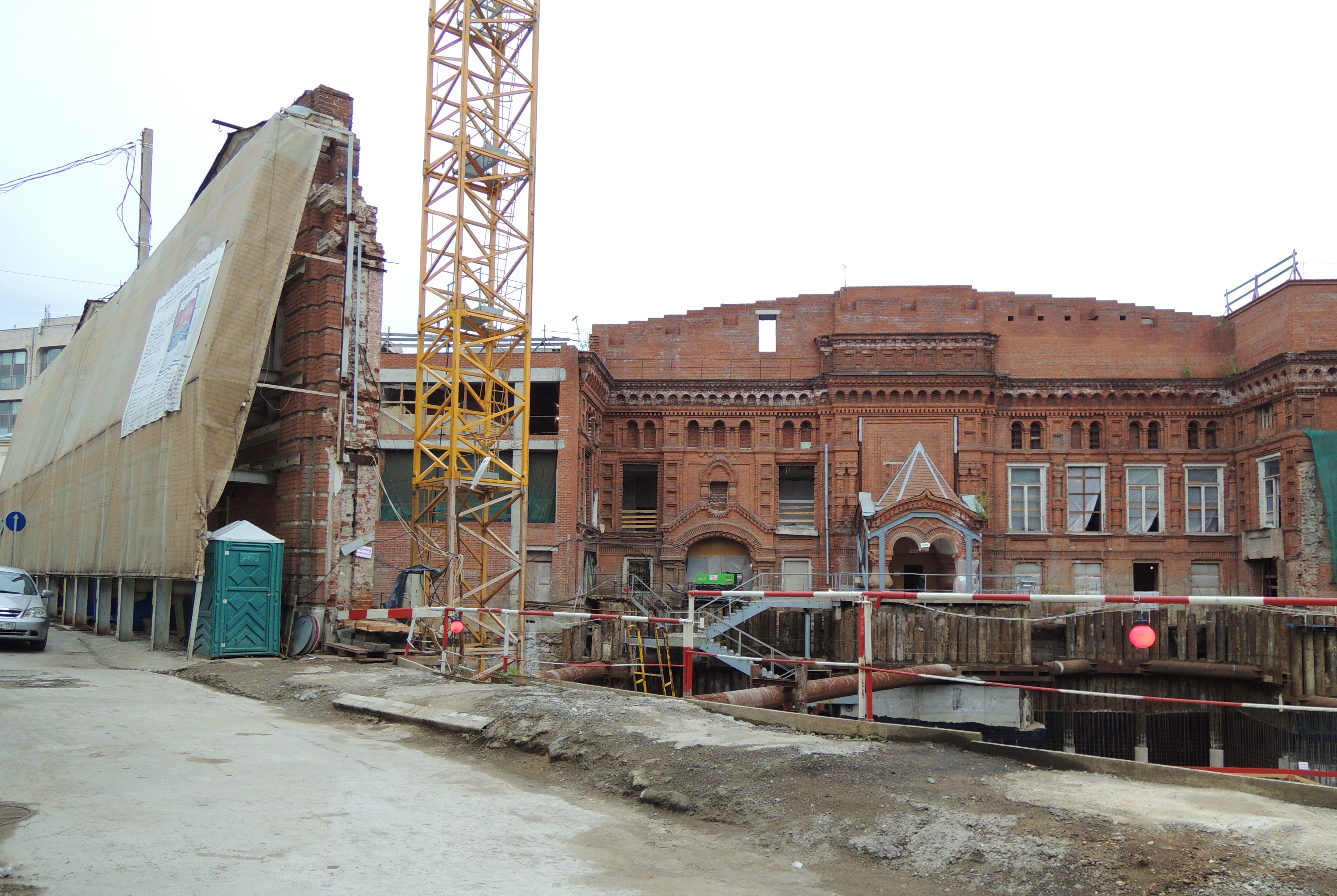 Helikon Opera